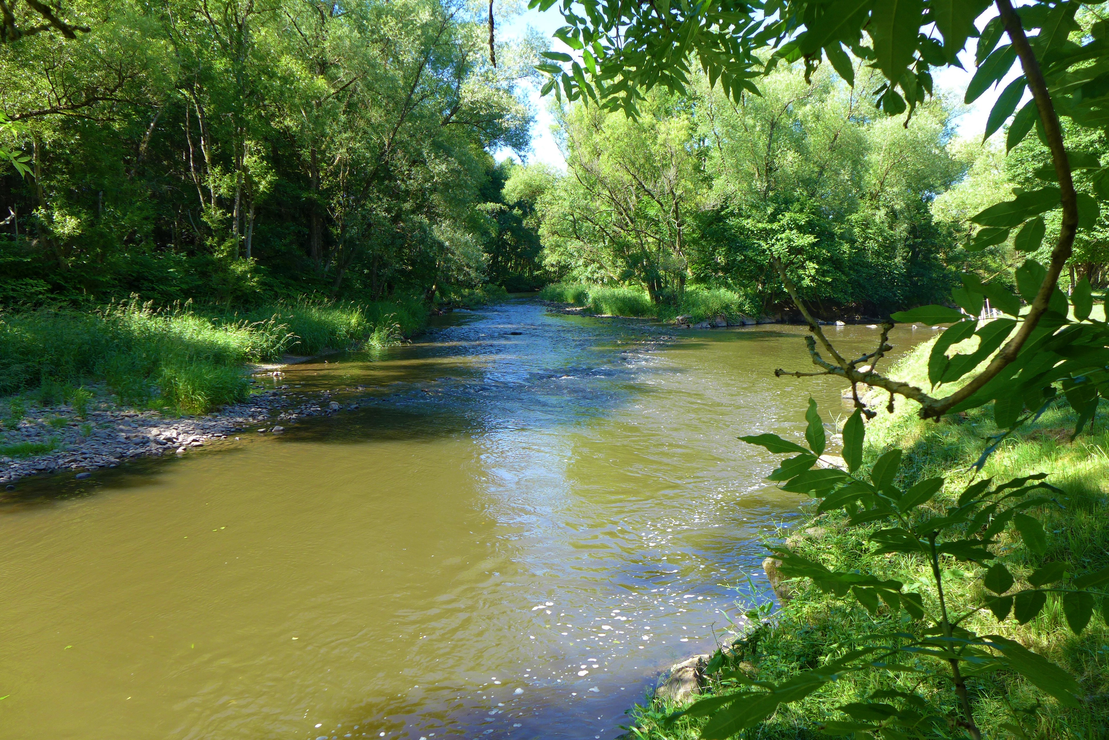 Mündung der Theel (rechts) in die Prims (links) am Rande der Gemarkung von Knorscheid